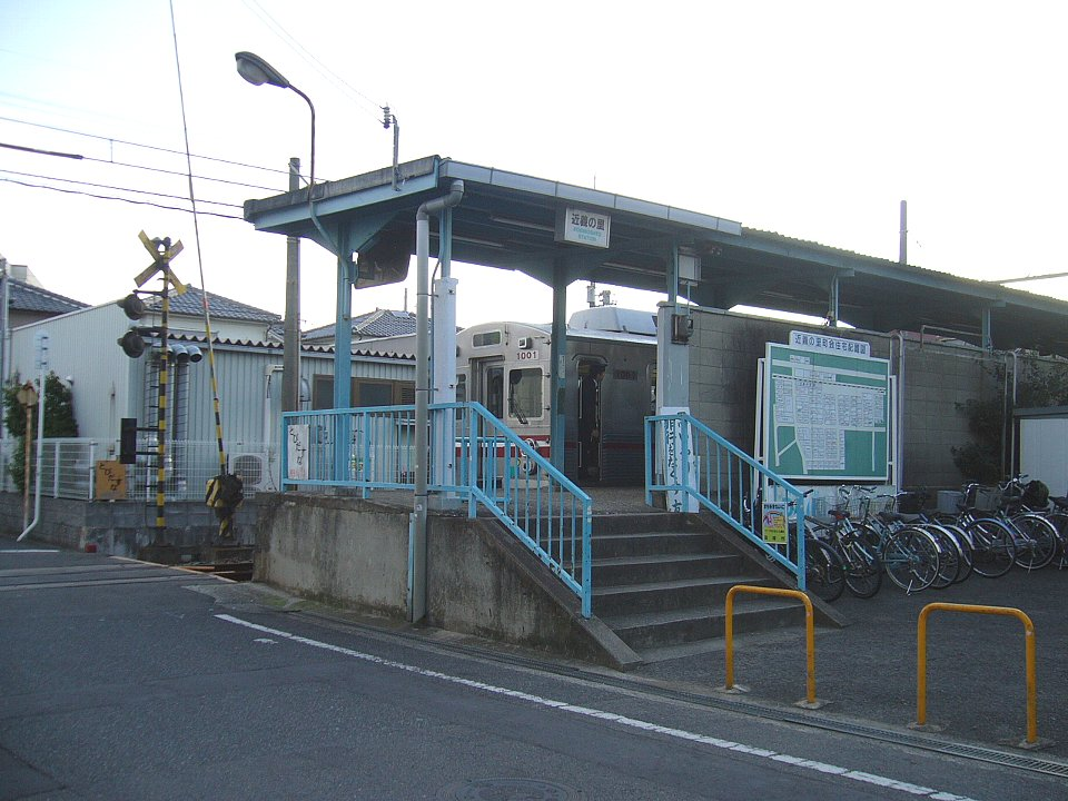 近義の里駅 2007年1月25日 Bakkai撮影